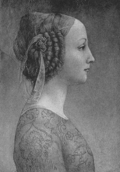 Ritratto probabile di Lucia Marliani